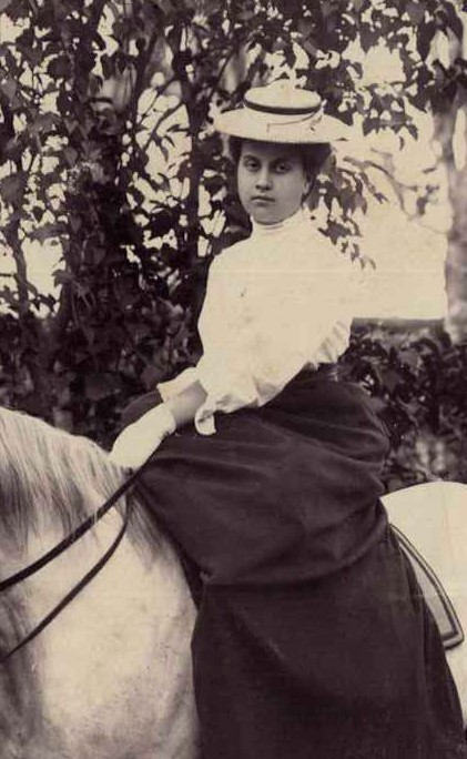 Елена Иосифовна Зотикова (Гранская), (1892-1946), 1910-е годы, Богородск, Московская губерния